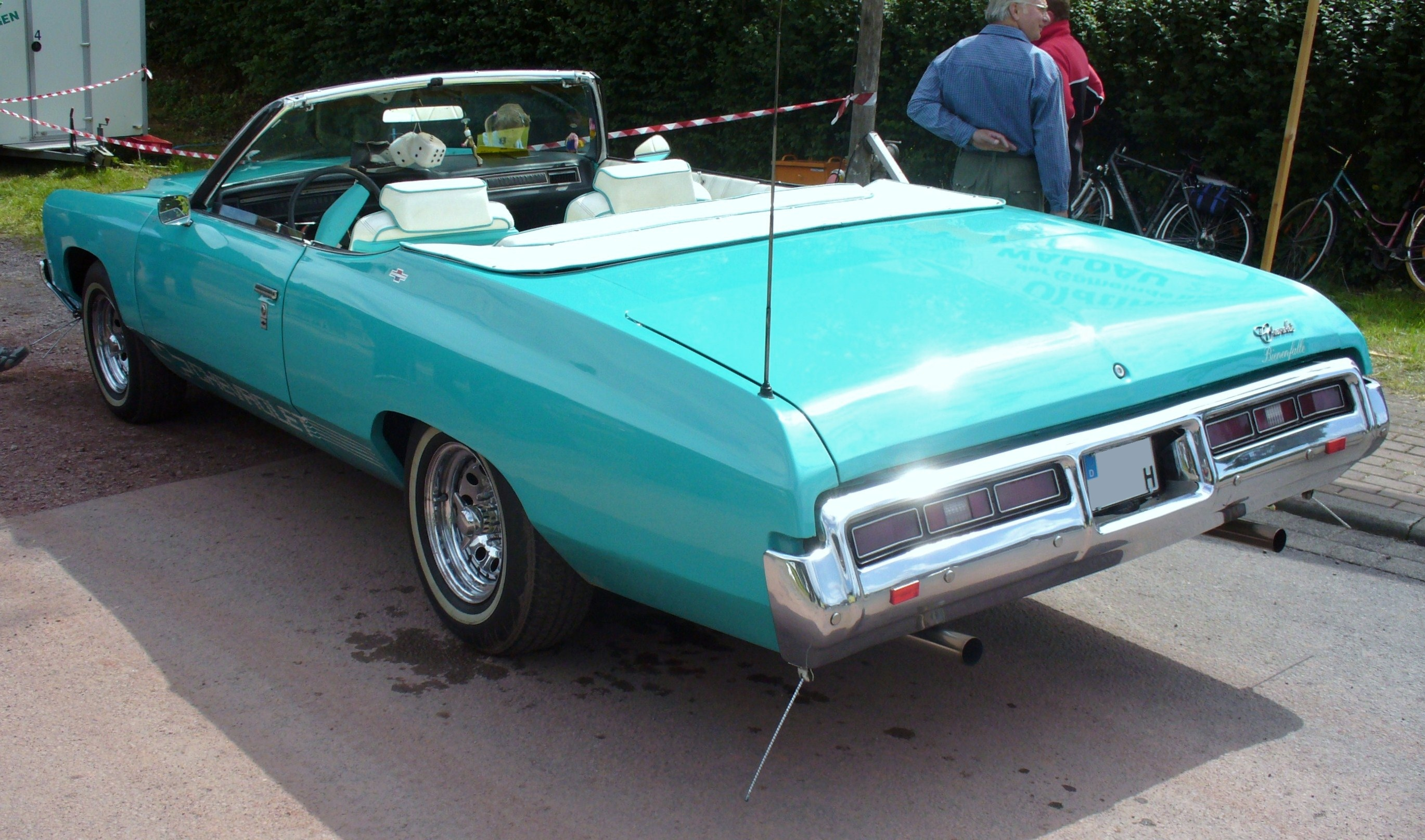 Chevrolet Impala Convertible 1972